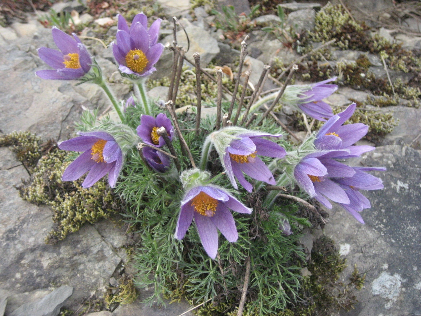 Däiiwelsbart (Pulsatilla vulgaris) bei Lellgen